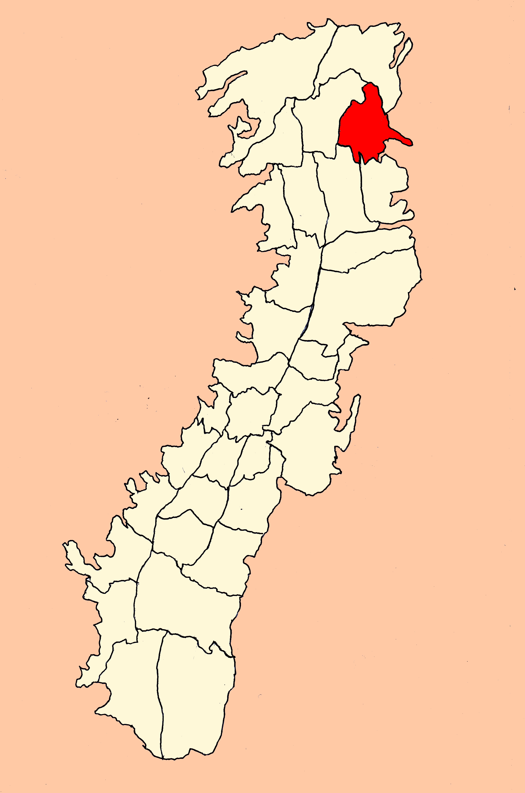 Parroquia Comité del Pueblo (Quito, Ecuador)